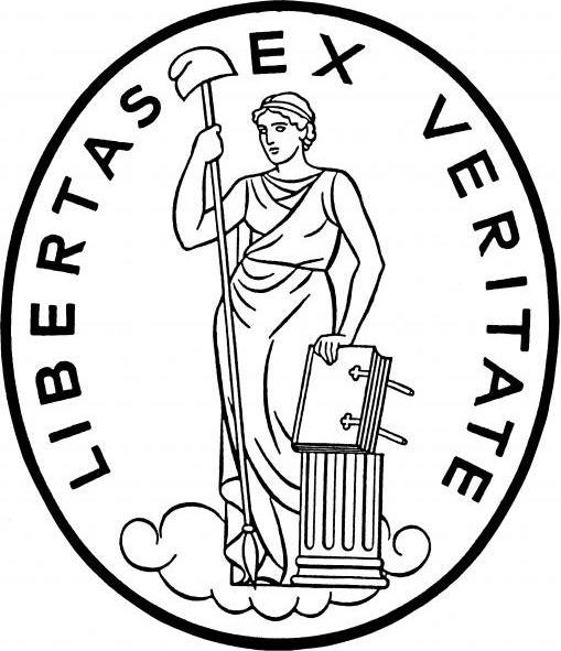 De Uniemaagd, verenigingssymbool der Societas Studiosorum Reformatorum (1910). Publiek domein